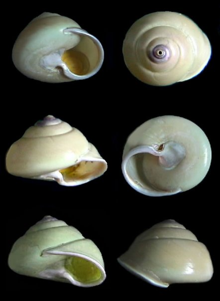 Gaza superba - Archipielago Islas de Aves (Barlovento), Dependencias Federales - Venezuela